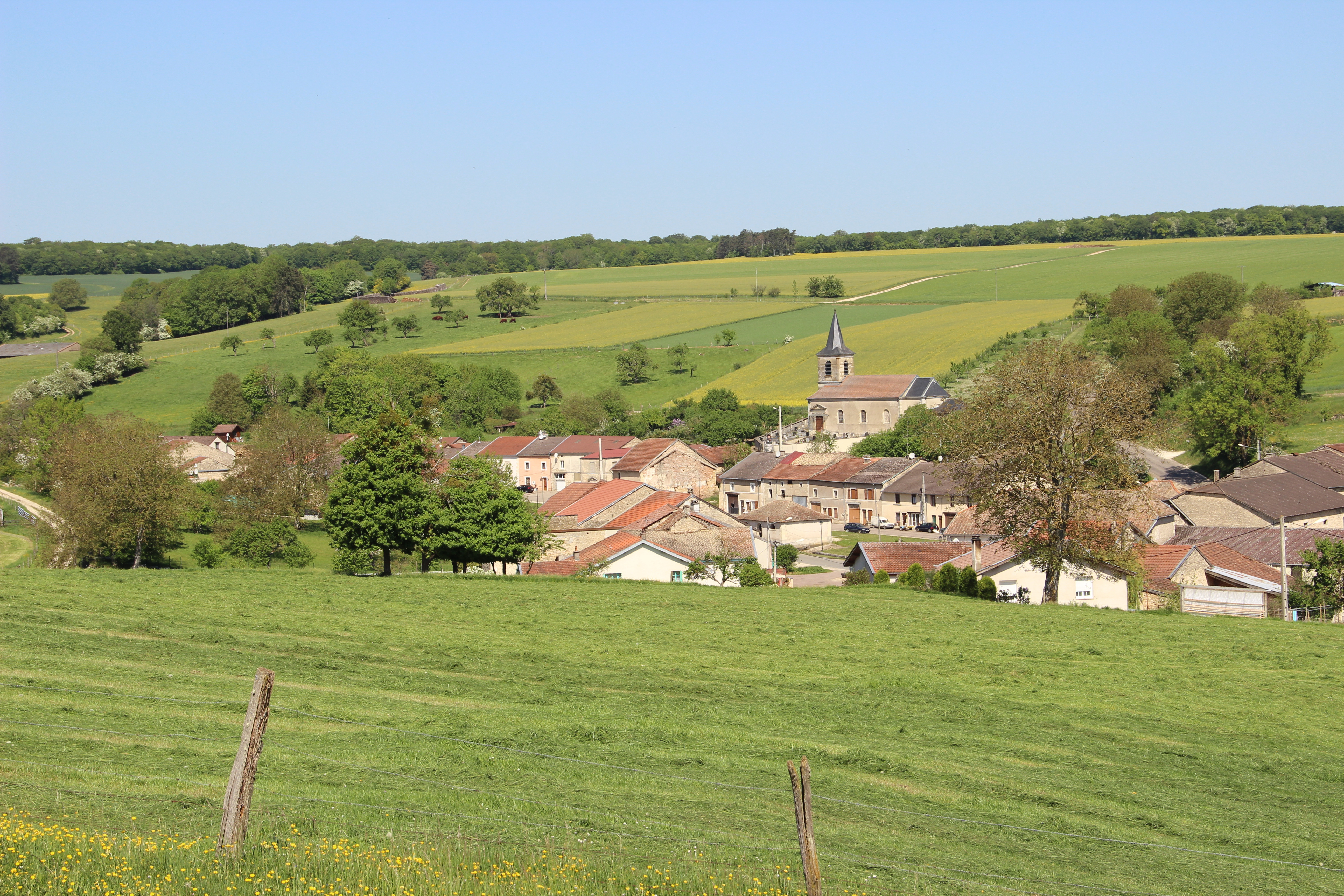 Vue du village de Vouthon-Bas